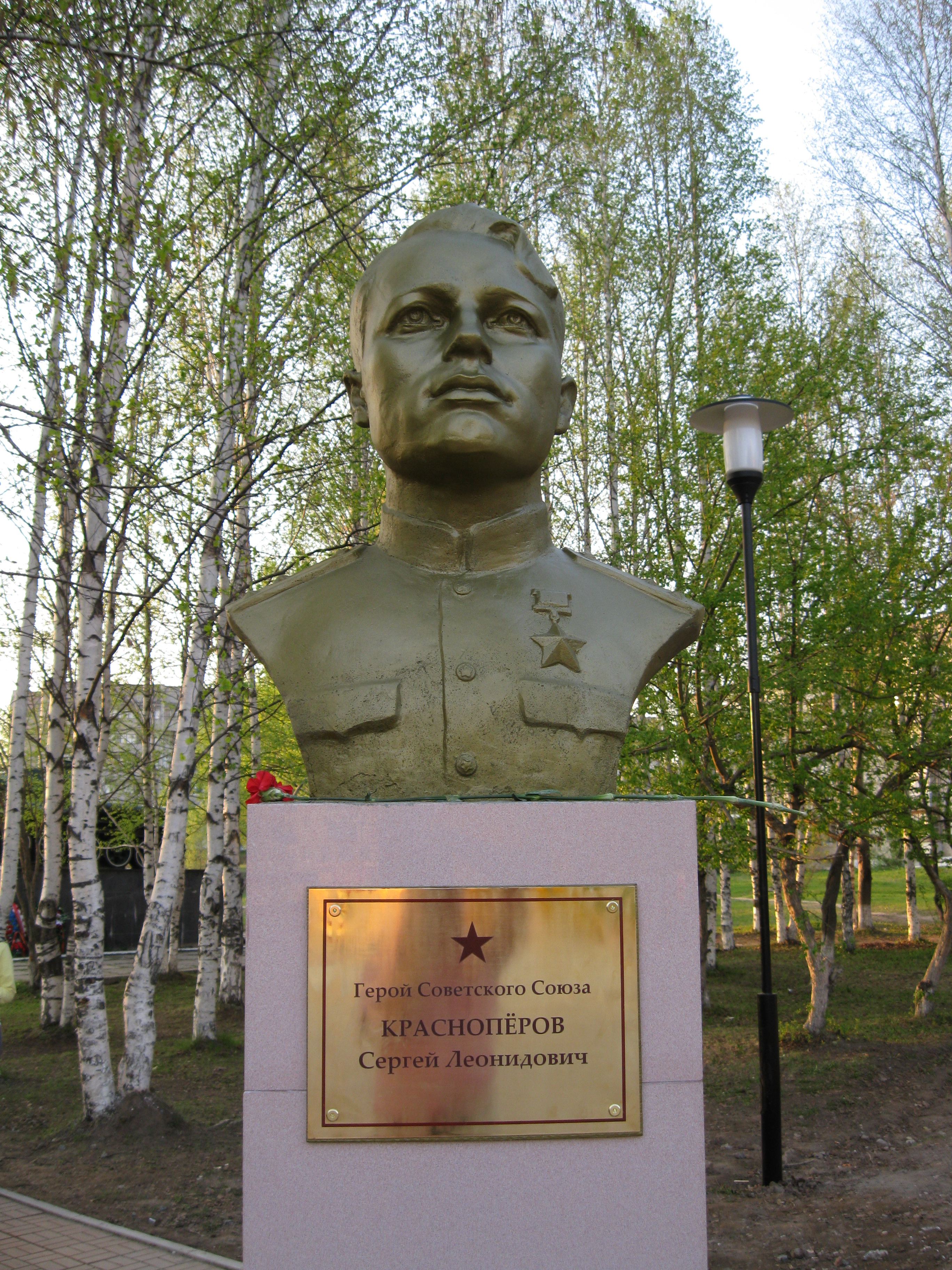 Бюст Сергея Леонидовича Краснопёрова на Аллее Славы, открытой 09.05.2010 года в городе Чернушка.